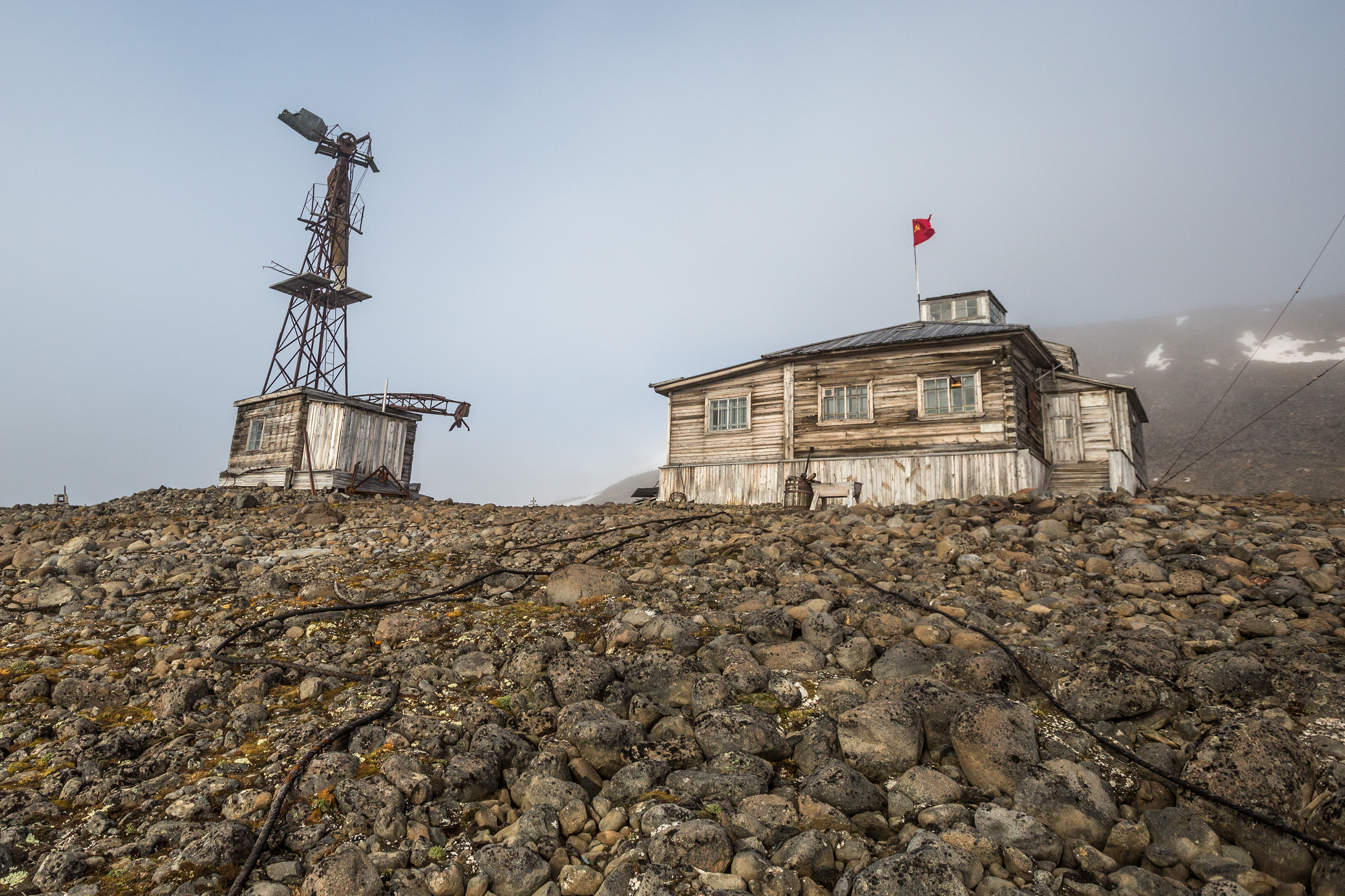 Сохранившиеся строения времен СССР на территории полярной станции "Бухта Тихая". Остров Гукера. Комплексный заказник Земля Франца-Иосифа: Архангельск, Приморский район, Архангельская область. Снимок сделан в рамках экспедиции "По следам двух капитанов", организованный Ассоциацией "Морское наследие" проекта "Архипелаги Арктики: Открытый океан". This image is related to the protected area of Russia number 2930163